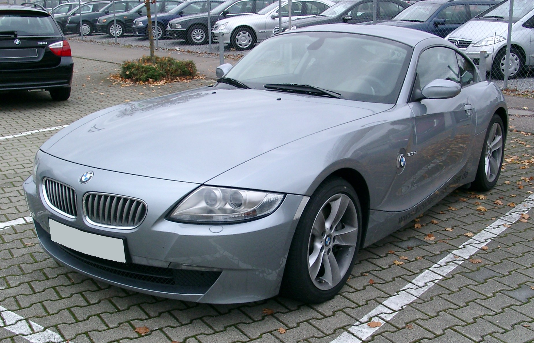 BMW Z4